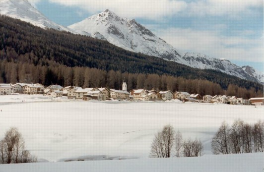 Das Dorf Fuldera im Münstertal, Kanton Graubünden, Schweiz. - Aufnahme: Jakob Vetsch, 20.02.1995.